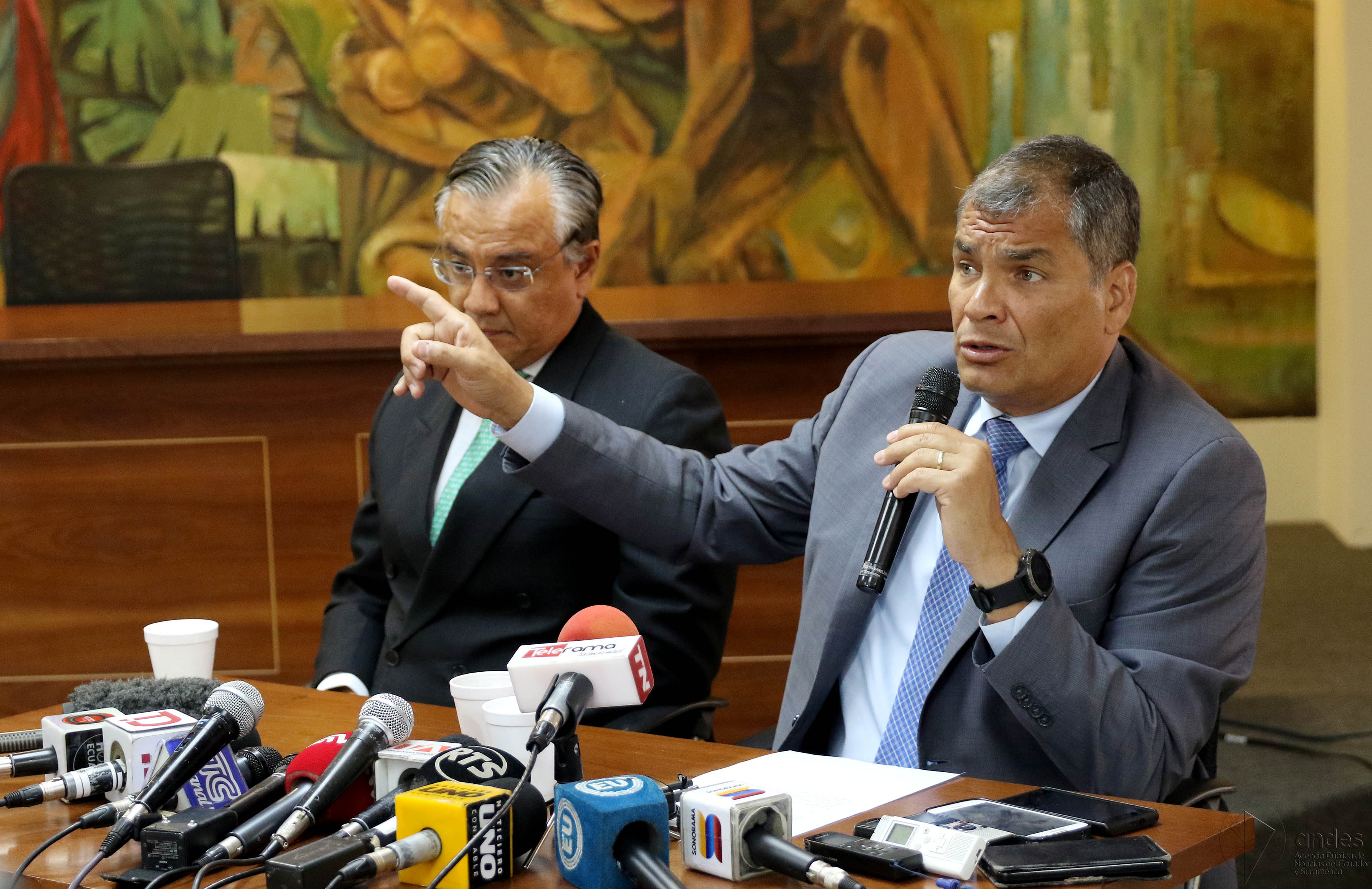 Guayaquil, lunes 05 de febrero de 2018 (Andes).-Luego de comparecer en la Fiscalía del Guayas, el expresidente Rafael Correa ofreció una rueda de prensa, lo acompañó Alexis Mera, exsecretario jurídico de la presidencia. Foto:Andes/César Muñoz Guayaquil, lunes 05 de febrero de 2018 (Andes).-Luego de comparecer en la Fiscalía del Guayas, el expresidente Rafael Correa ofreció una rueda de prensa, lo acompañó Alexis Mera, exsecretario jurídico de la presidencia. Foto:Andes/César Muñoz